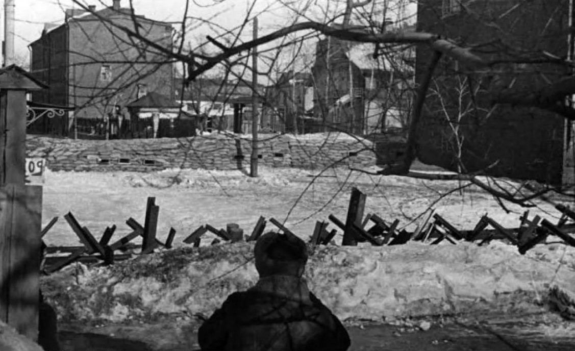 Москва прифронтовая. Противотанковые ежи и баррикады у полиграфического комбината газеты «Правда»